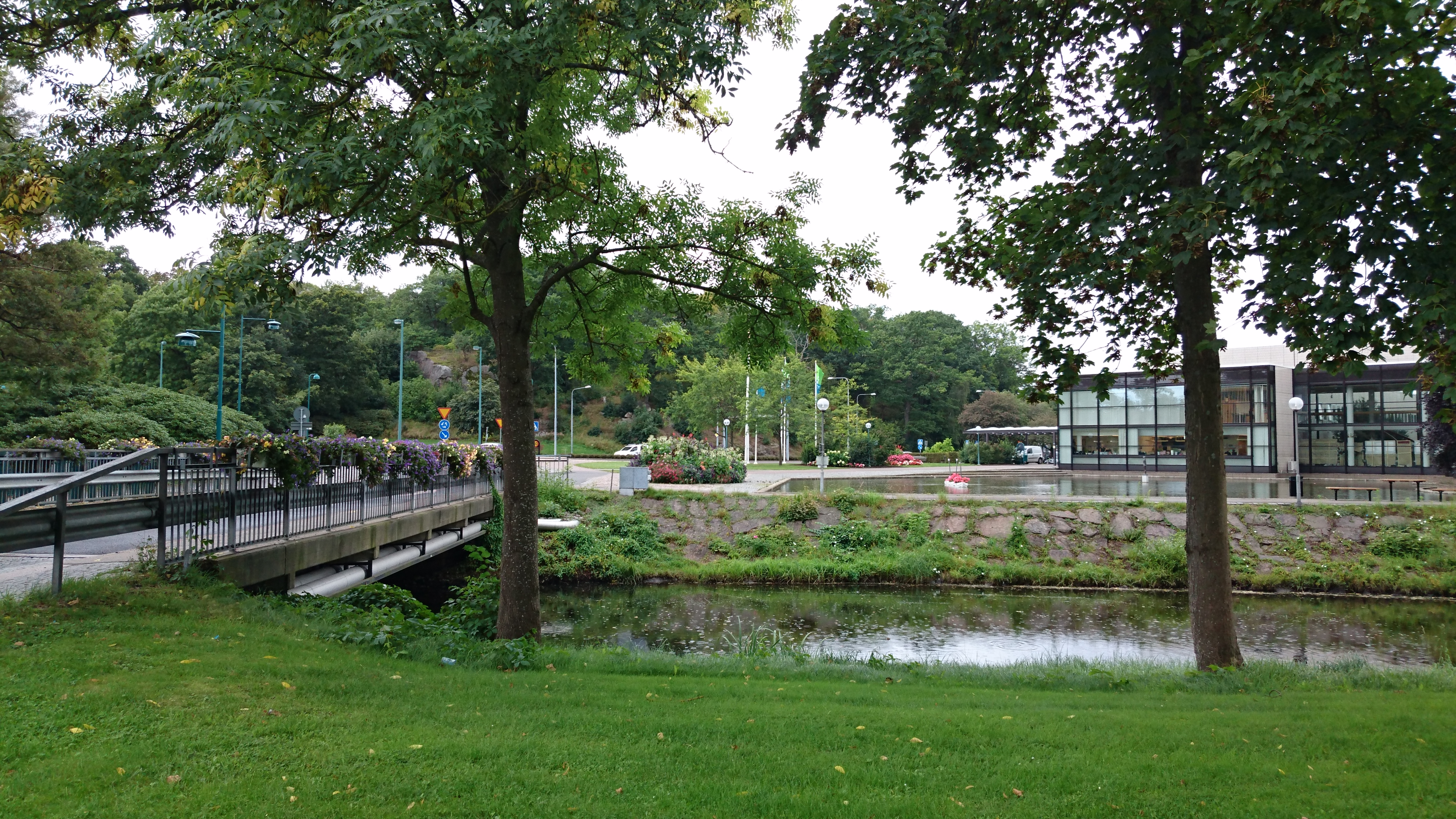 Stadshusbron i Ronneby fotograferad från östra stranden sommaren 2017.